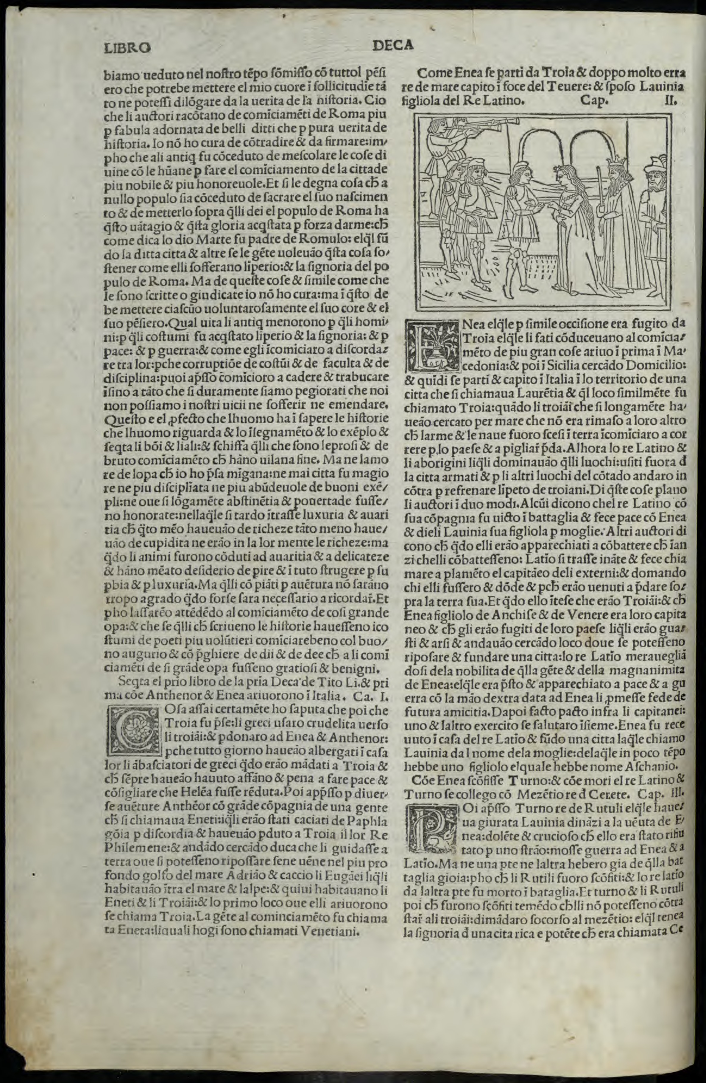 Ab urbe condita (italiano). Segue: Leonardo Bruni: De primo bello Punico (italiano). - Stampate nella inclita cittade di Venetia : per Zovane Vercellense ad istancia del nobile ser Luca Antonio Zonta fiorentino, nel anno MCCCCLXXXXIII adi XI del mese di febraio. - 140, 122, 120 c. ; [*]⁸, [**]¹⁰, a-o⁸, p¹⁰, aa-oo⁸, pp¹⁰, A-P⁸ ; fol. - Marca tipografica nell'explicit. - Manca la c. dd4 .